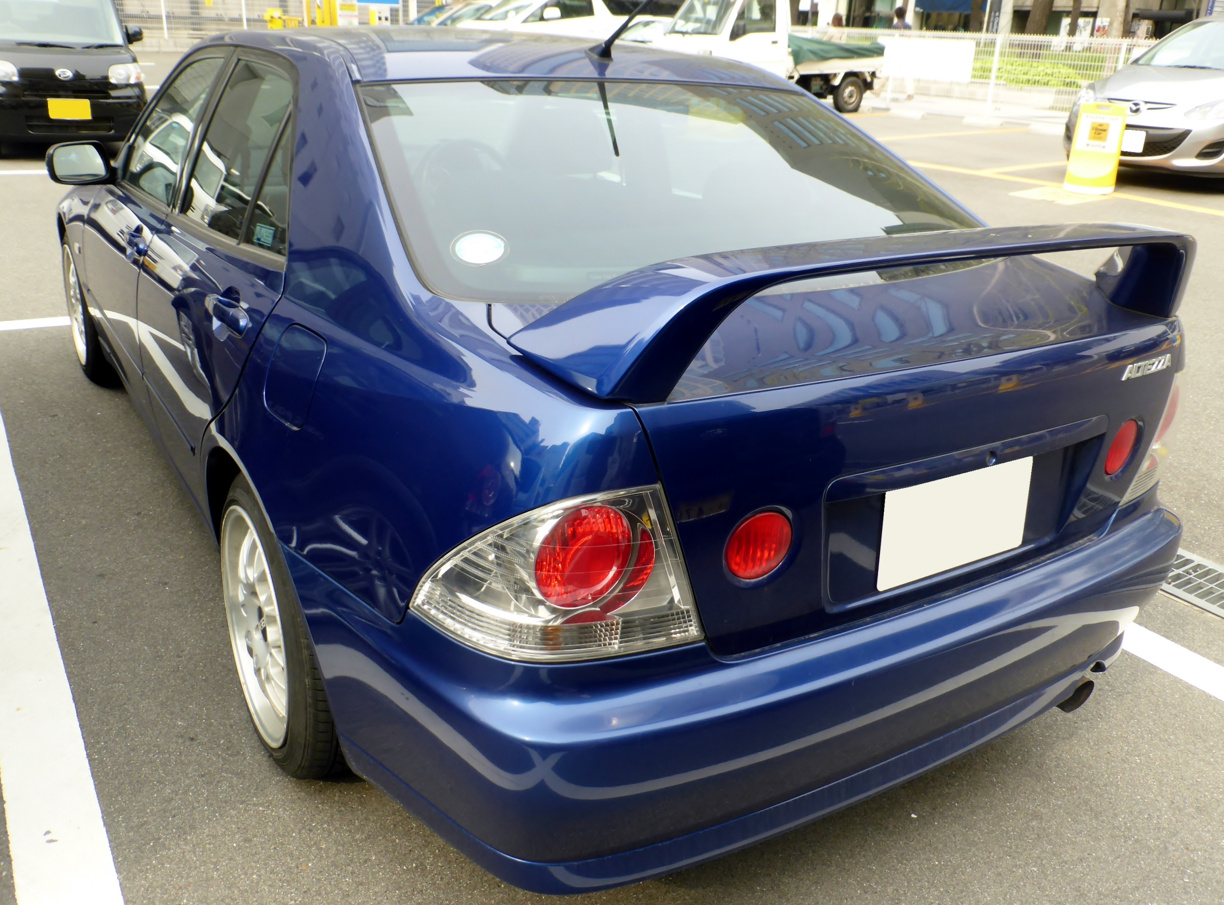 SXE10型トヨタ・アルテッツァRS200をリアから撮影。